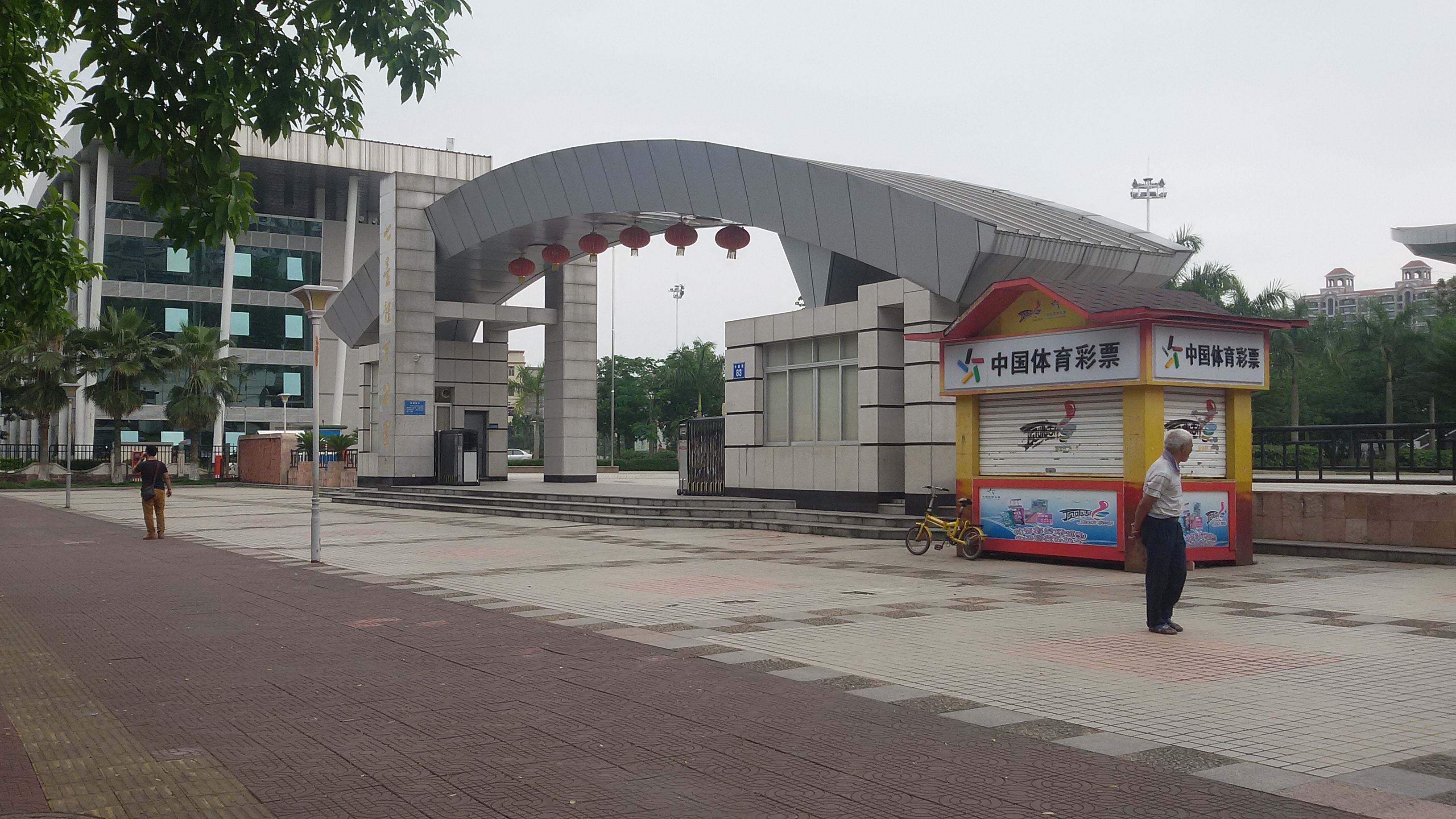 粵語: 七星体育公园大门